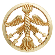 Insigne de béret du service des poudres.